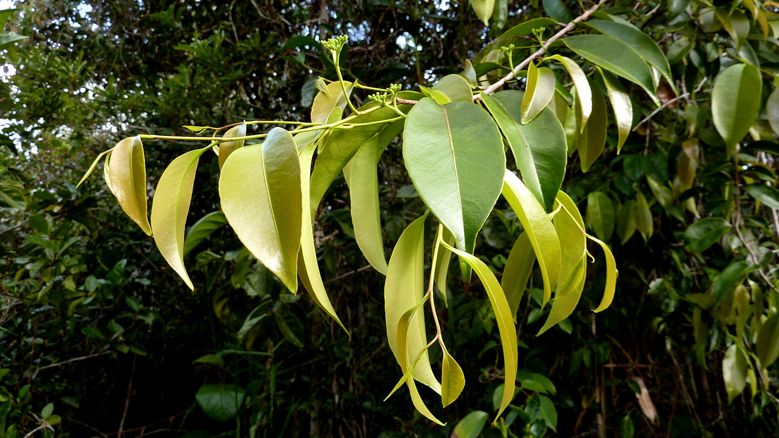 Sacoglottis mattogrossensis Malme